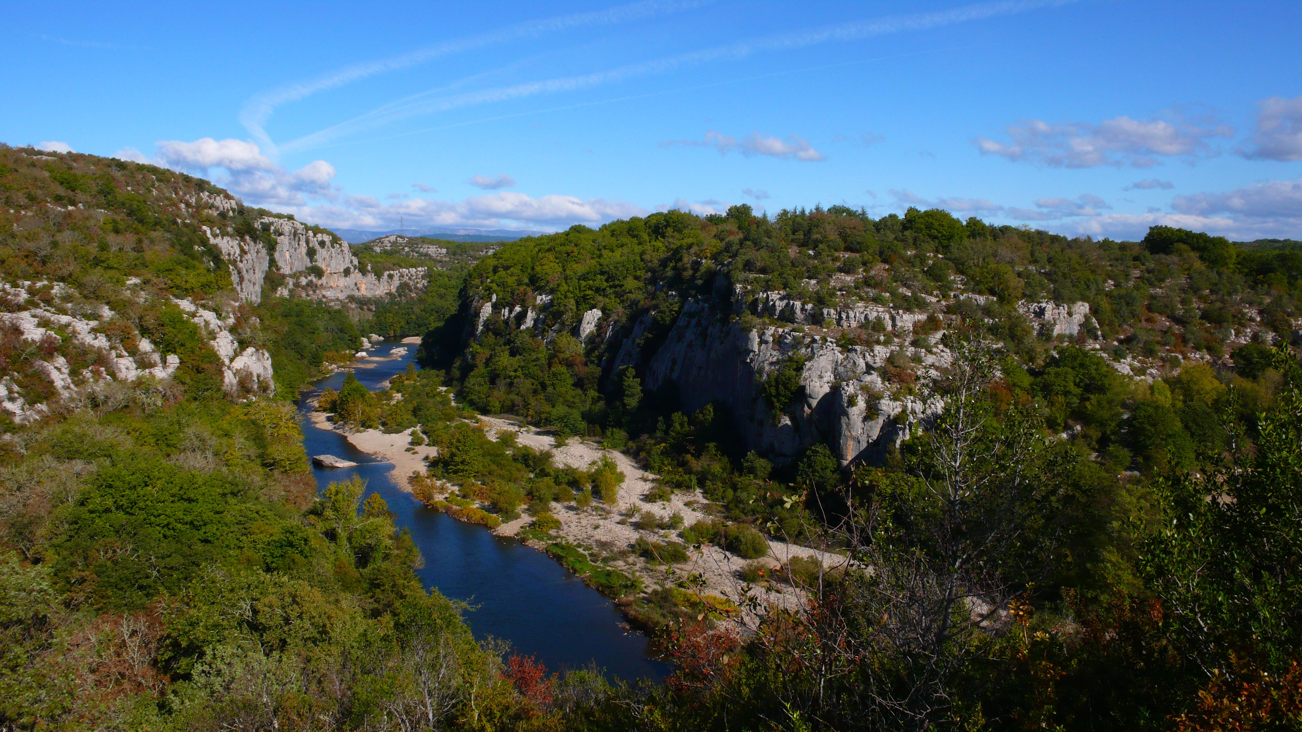 Gorges du Chassezac